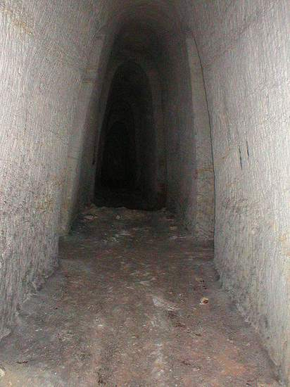 vnitřní chodba v kaolínovém dole "Orty" u Českých budějovic